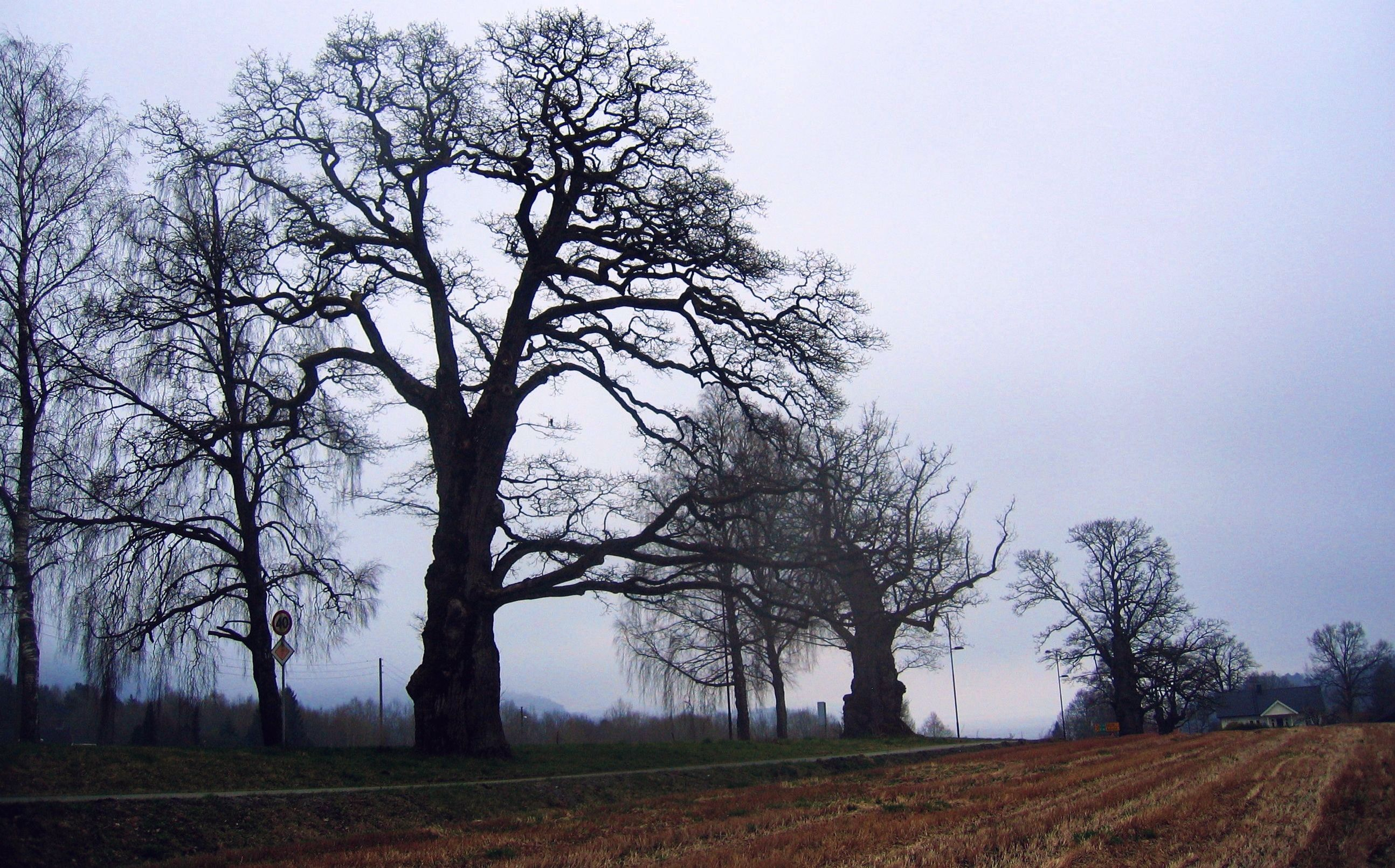 Allé med gamle Eiketrær i Eidanger, Porsgrunn kommune.